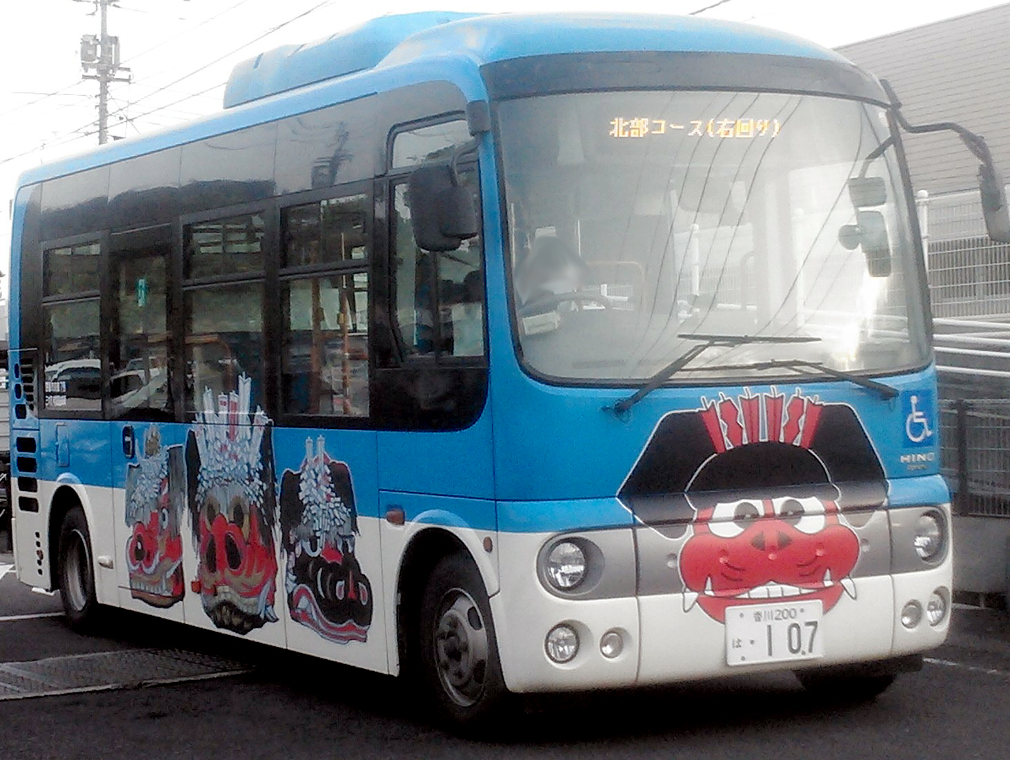 三木町コミュニティバス1号車前右側面。学園通り駅バス停にて投稿者自身による撮影。